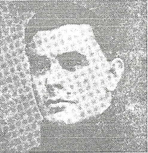 Presbítero Julián Lagos, quien diera el nombre de San Antonio de Padua la pueblo ubicado en Merlo, Argentina.